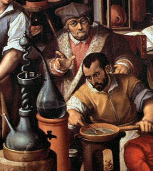 Francesco I nel suo laboratorio alchemicodetail